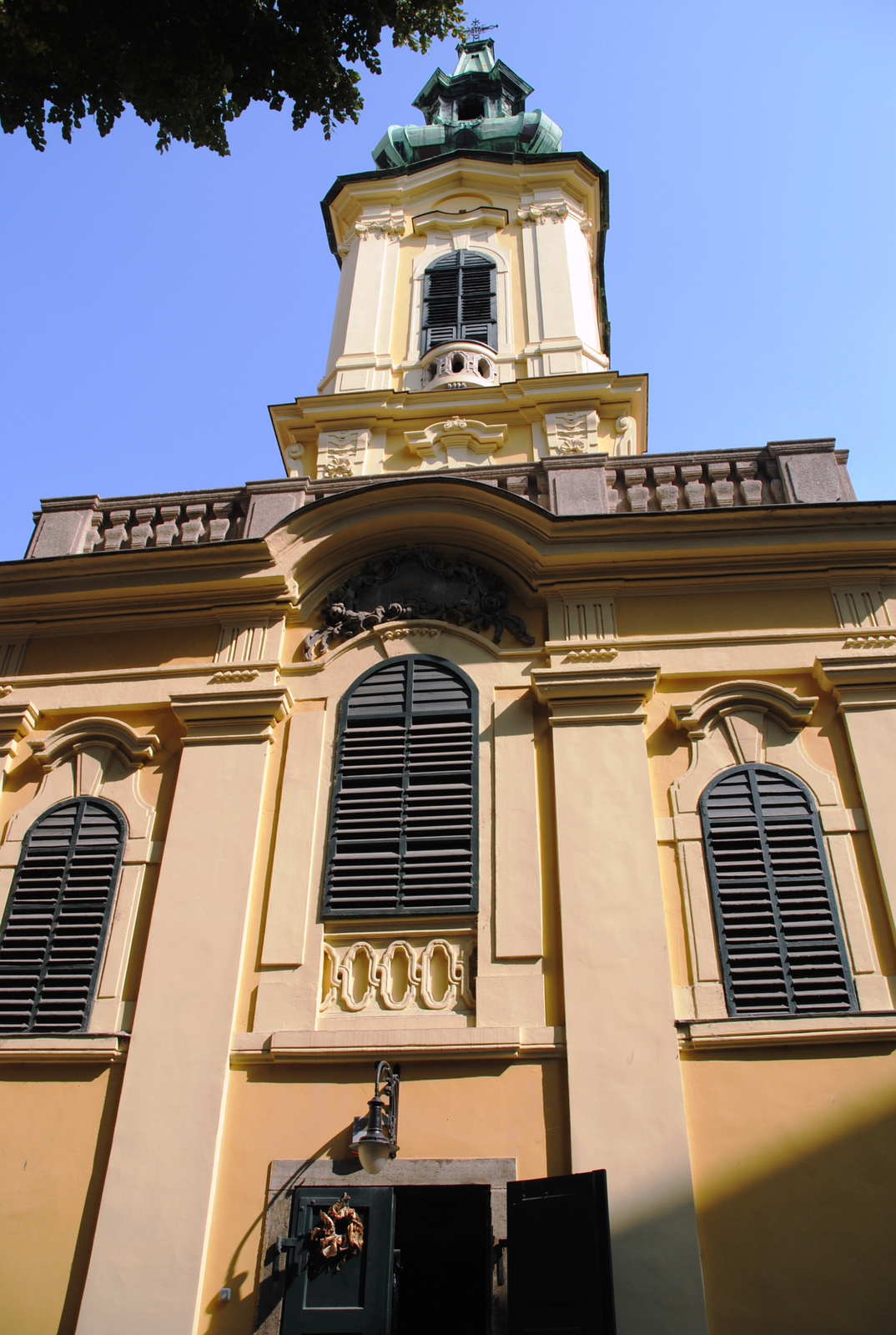 Görögkeleti szerb templom (Budapest 5, Szerb utca 4., Veres Pálné utca 23.) This is a photo of a monument in Hungary. Identifier: 618